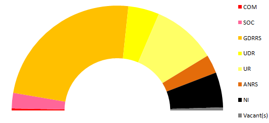 Répartition des sénateurs suivant leur groupe parlementaire après les élections sénatoriales de 1938.